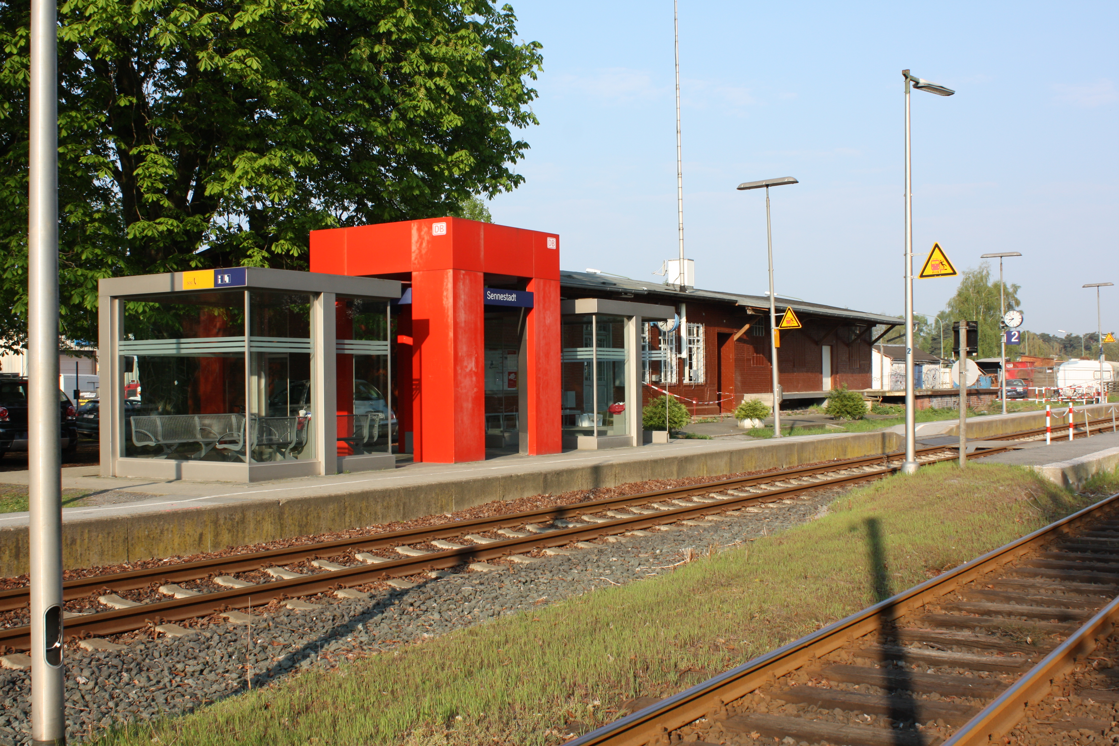 Bahnhof Sennestadt